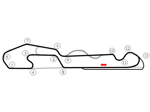 Circuito NOLA Motorsports Park de Louisiana